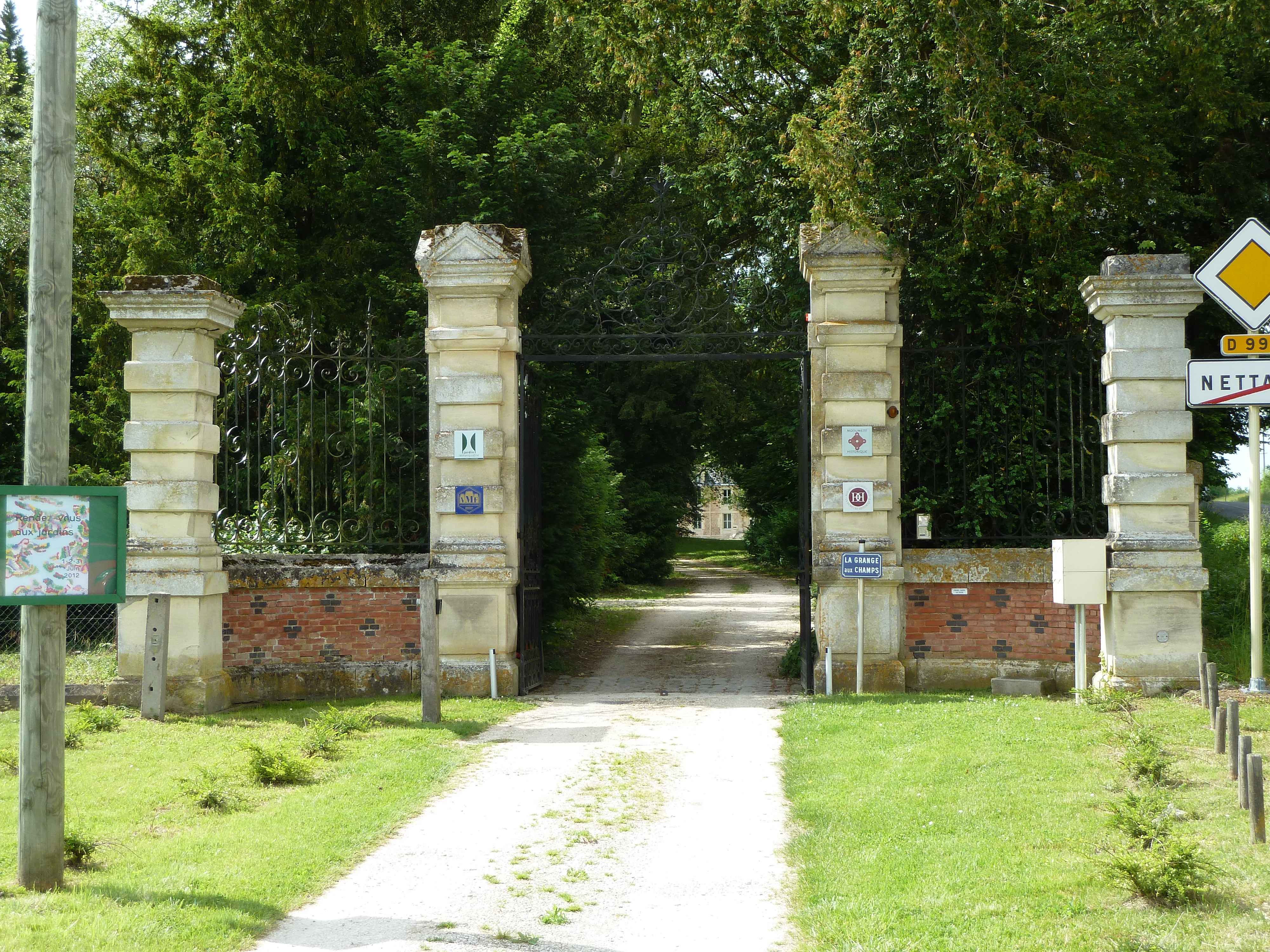 Nettancourt La Grange aux Champs : portes ouvertes pendant l'opération des "Rendez-vous aux jardins" le premier week-end de juin.